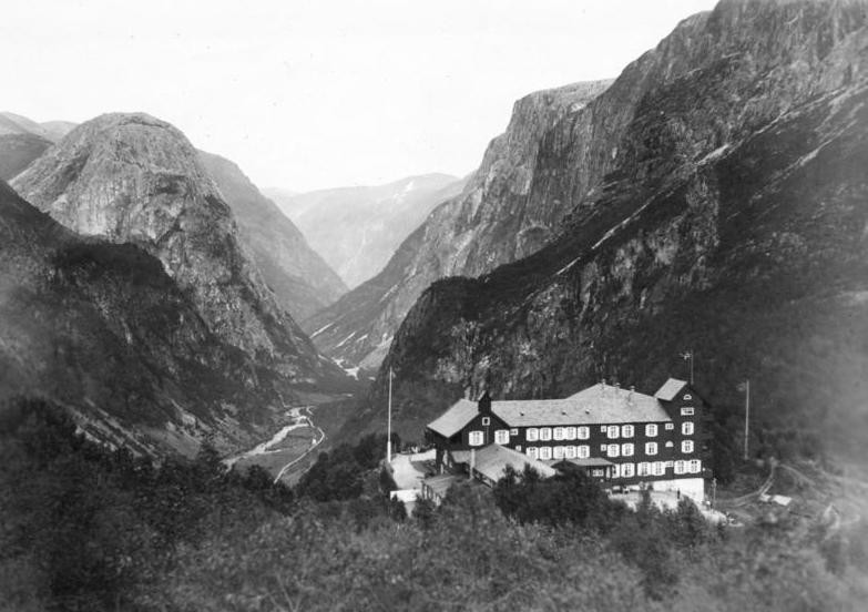 Polarfahrt mit dem Dampfer "München".- Stahlheim-Hotel 17. Juli - 12. August 1925